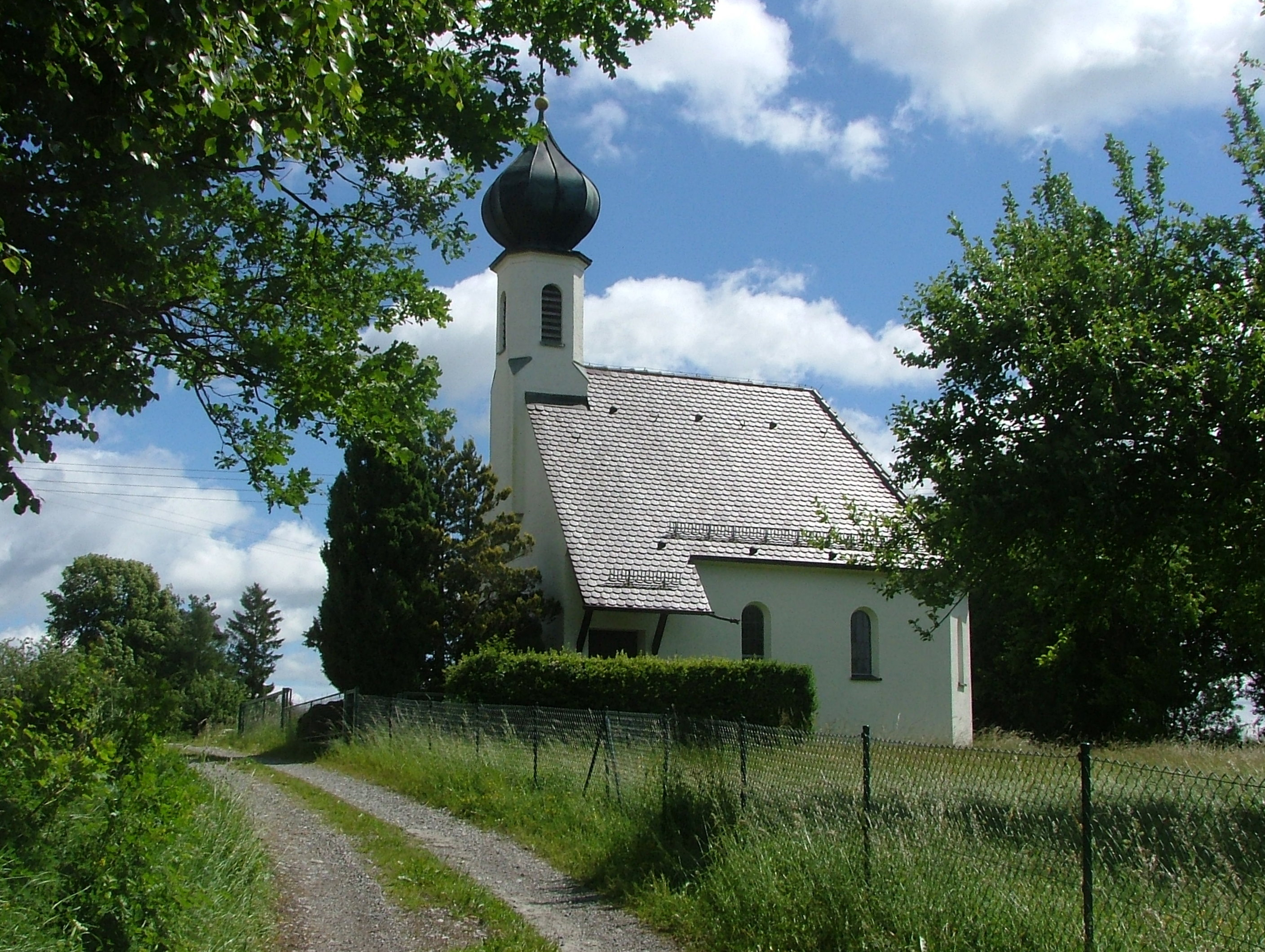 Kapelle Depprich